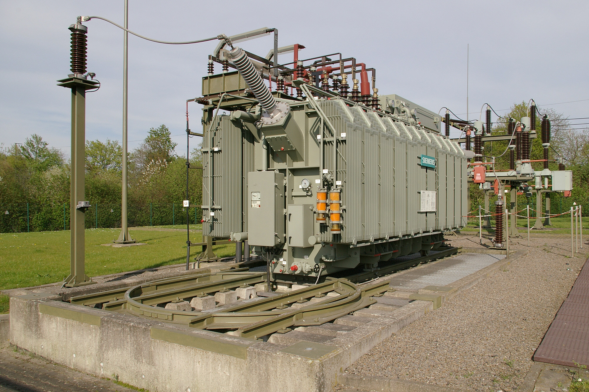 Transformator in der Umspannstation Alter Hellweg in Unna